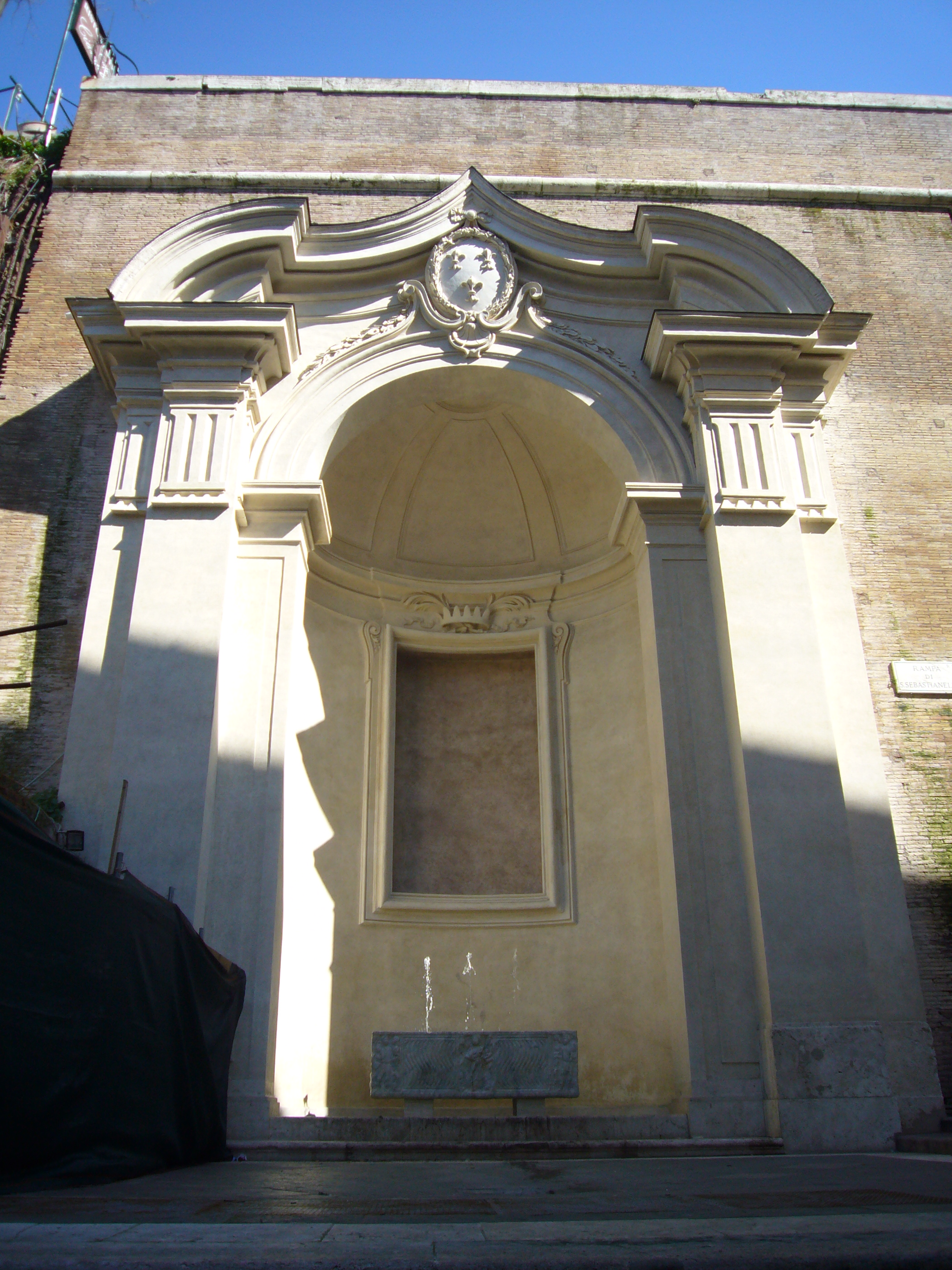 Roma, fontana del bottino dell'Acqua Vergine a san Sebastianello